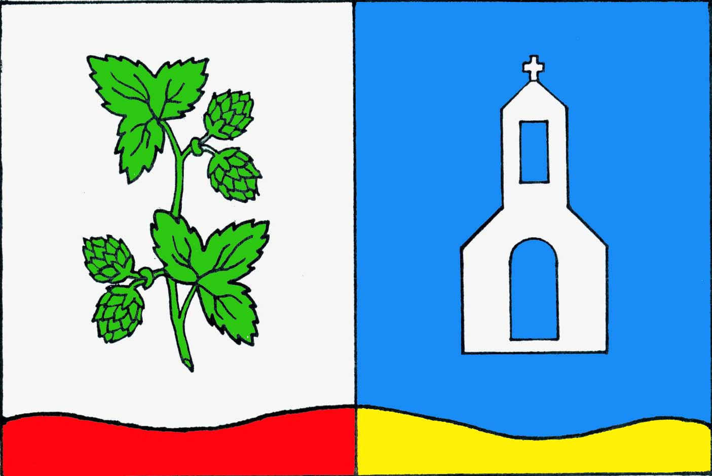 Vlajka obce Holedeč